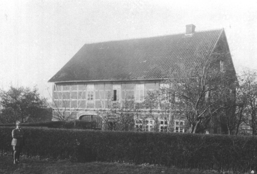 Das alte Schulgebäude von Boitzum